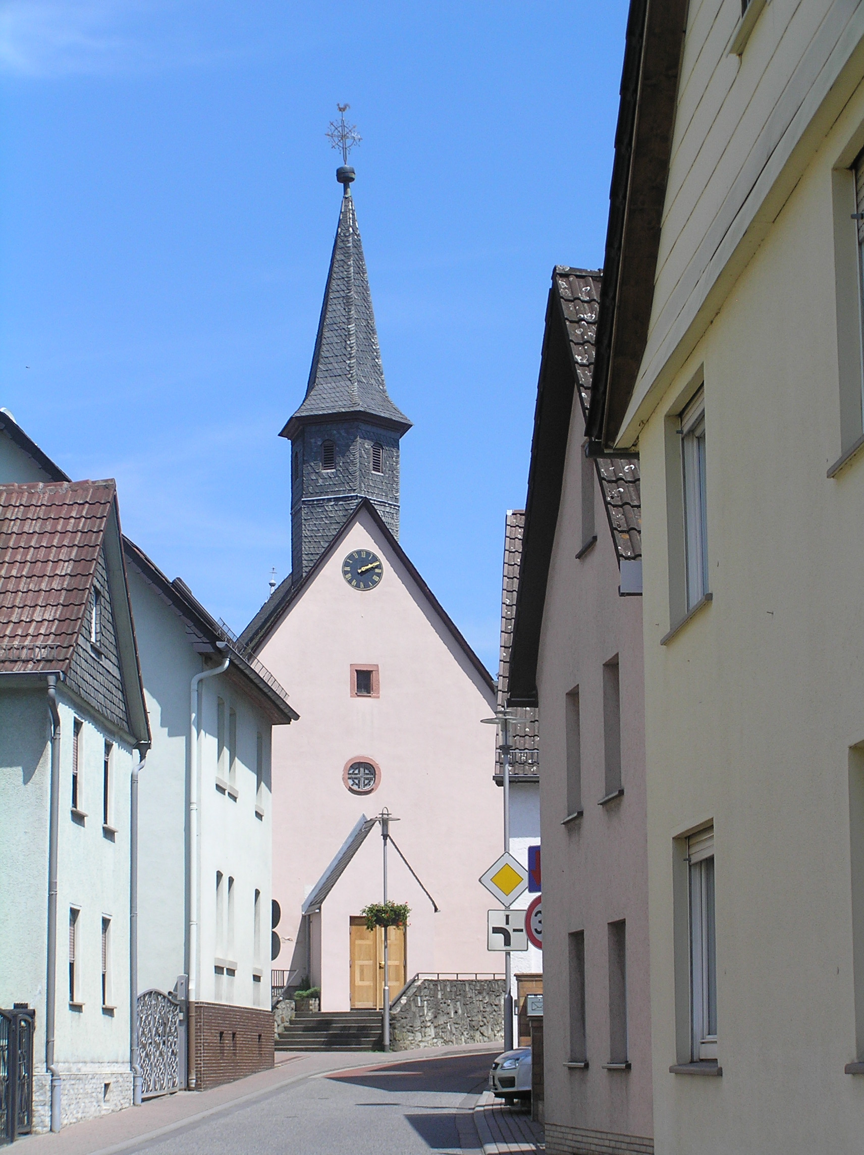 Ehlhalten, St. Michaelskirche